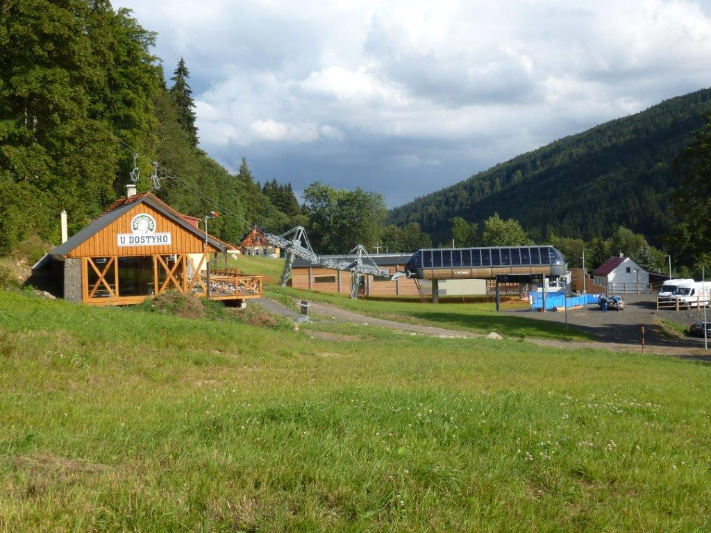 Pstruží - Aufzug Sommer Pstruží - lift summer